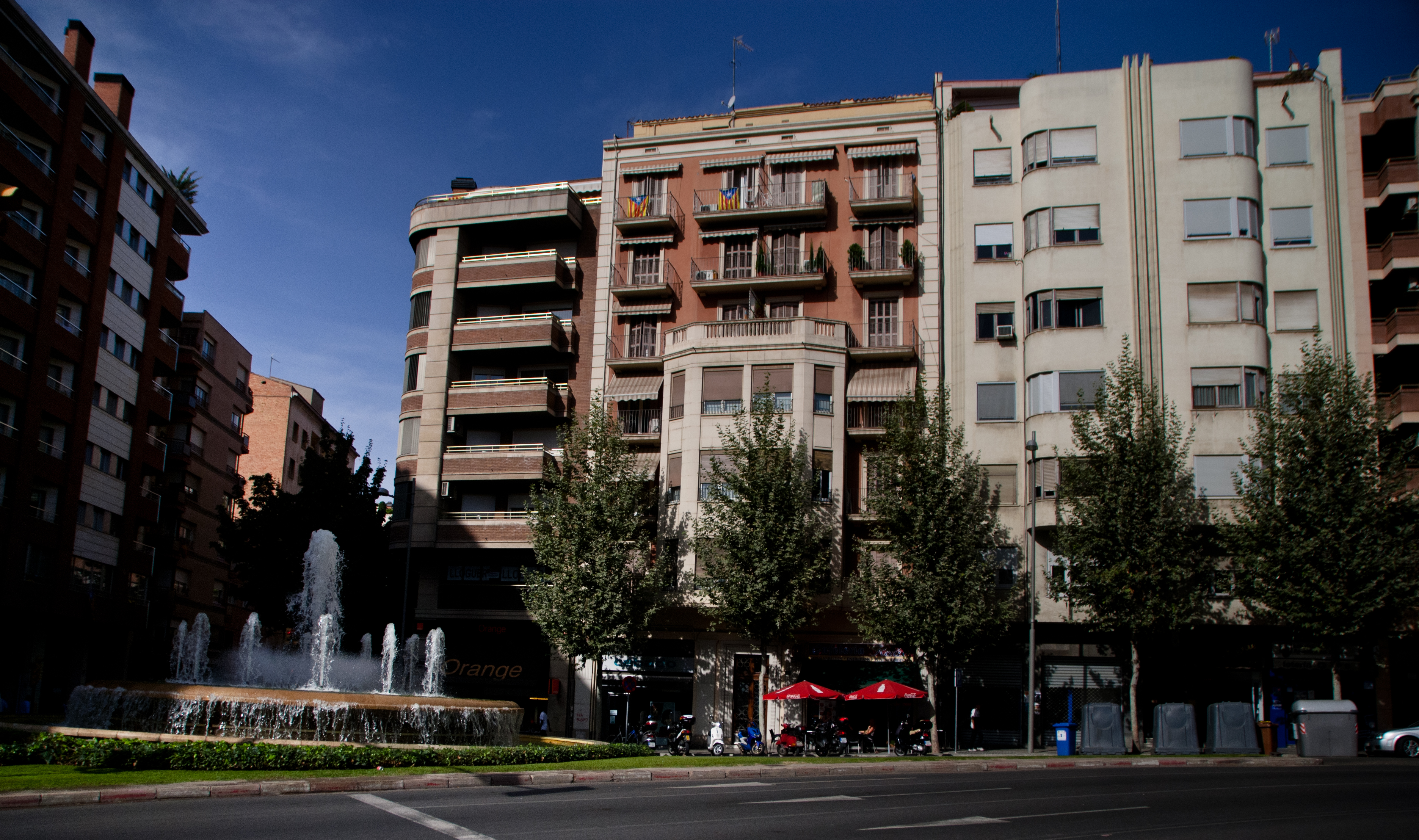 Edifici a la rambla d'Aragó, 5 (Lleida)